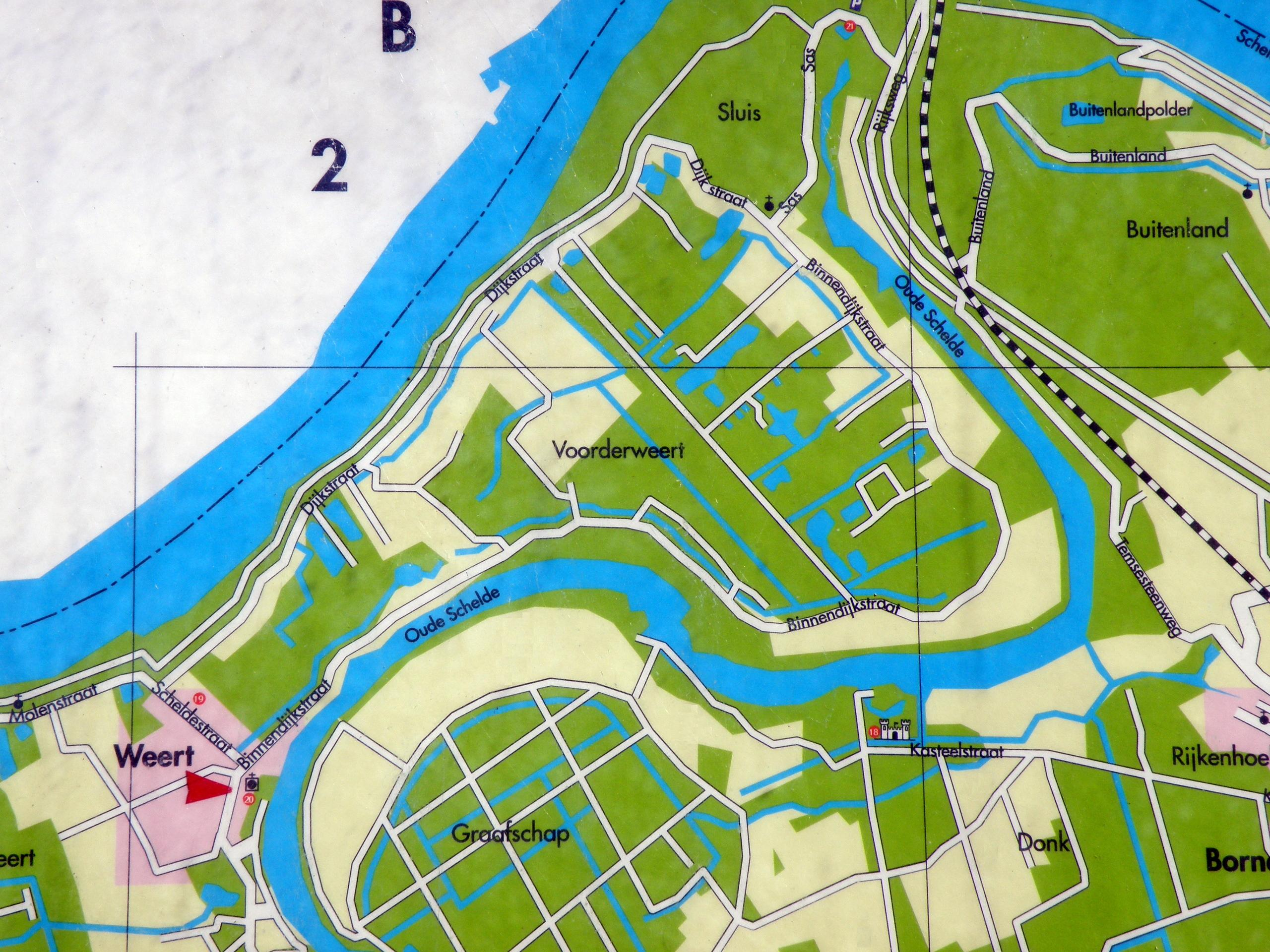 Weert, gemeente Bornem (prov. Antwerpen, België). Plattegrond (hangt op verschillende plaatsen uit in Bornem).